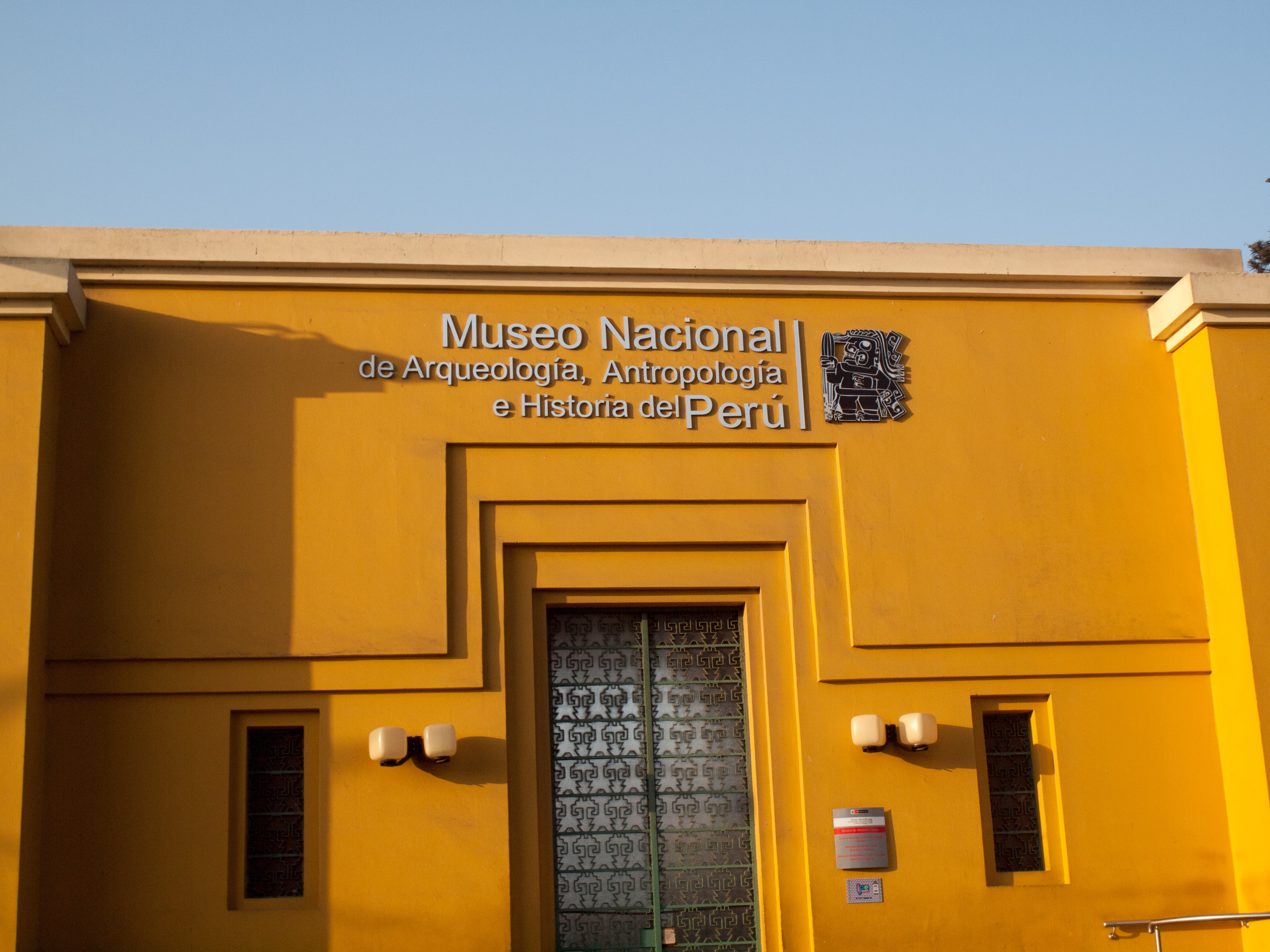 Ingreso al Museo de Antropología y Arqueología